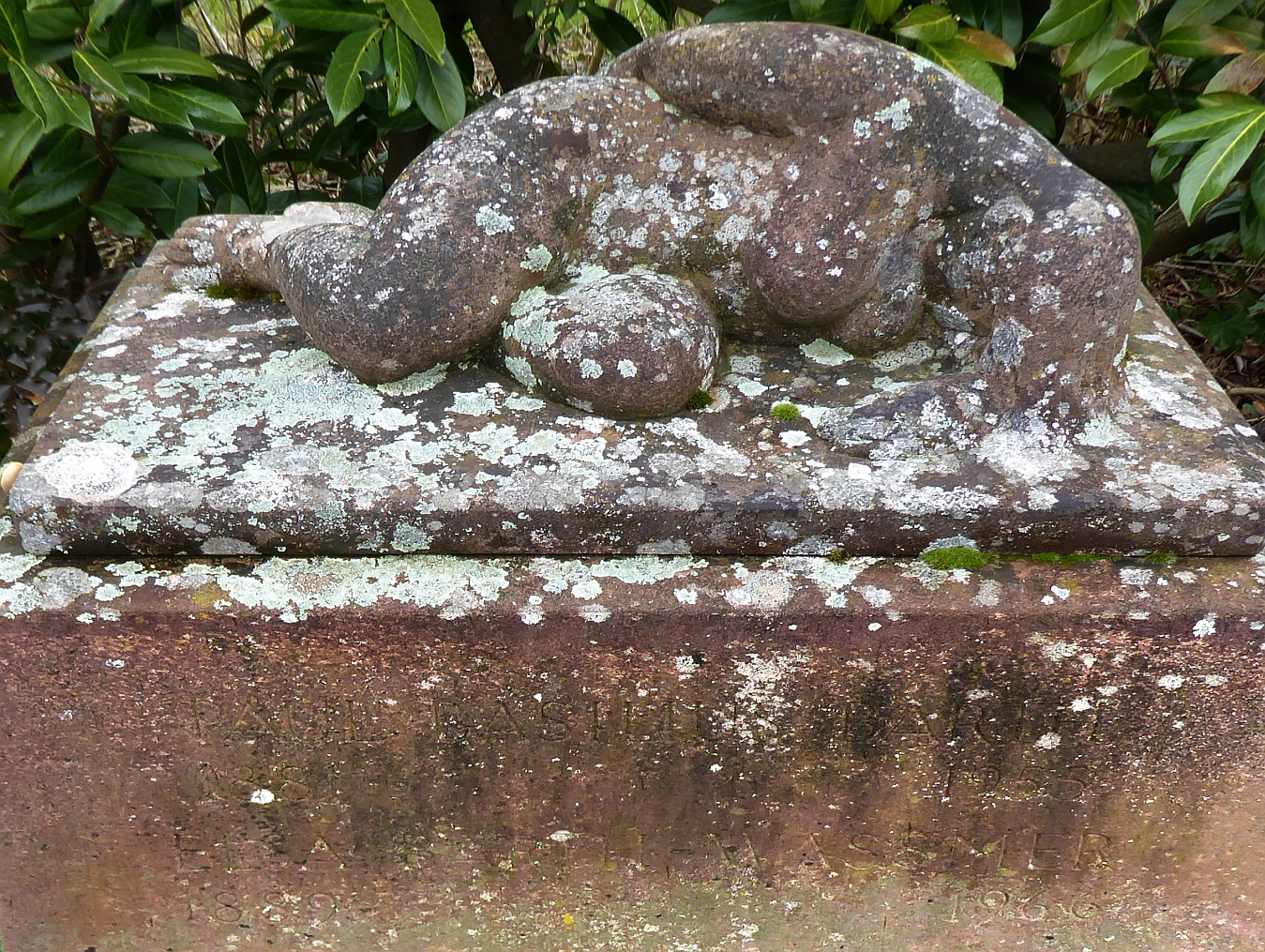 Paul Basilius Barth (1881–1955) Kunstmaler, Zeichner, Stillleben, Portrait, Elsa Barth-Wassmer (1889–1966) Grab auf dem Friedhof Hörnli, Riehen, Basel-Stadt